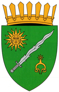 CoA of Budeşti, Chişinău